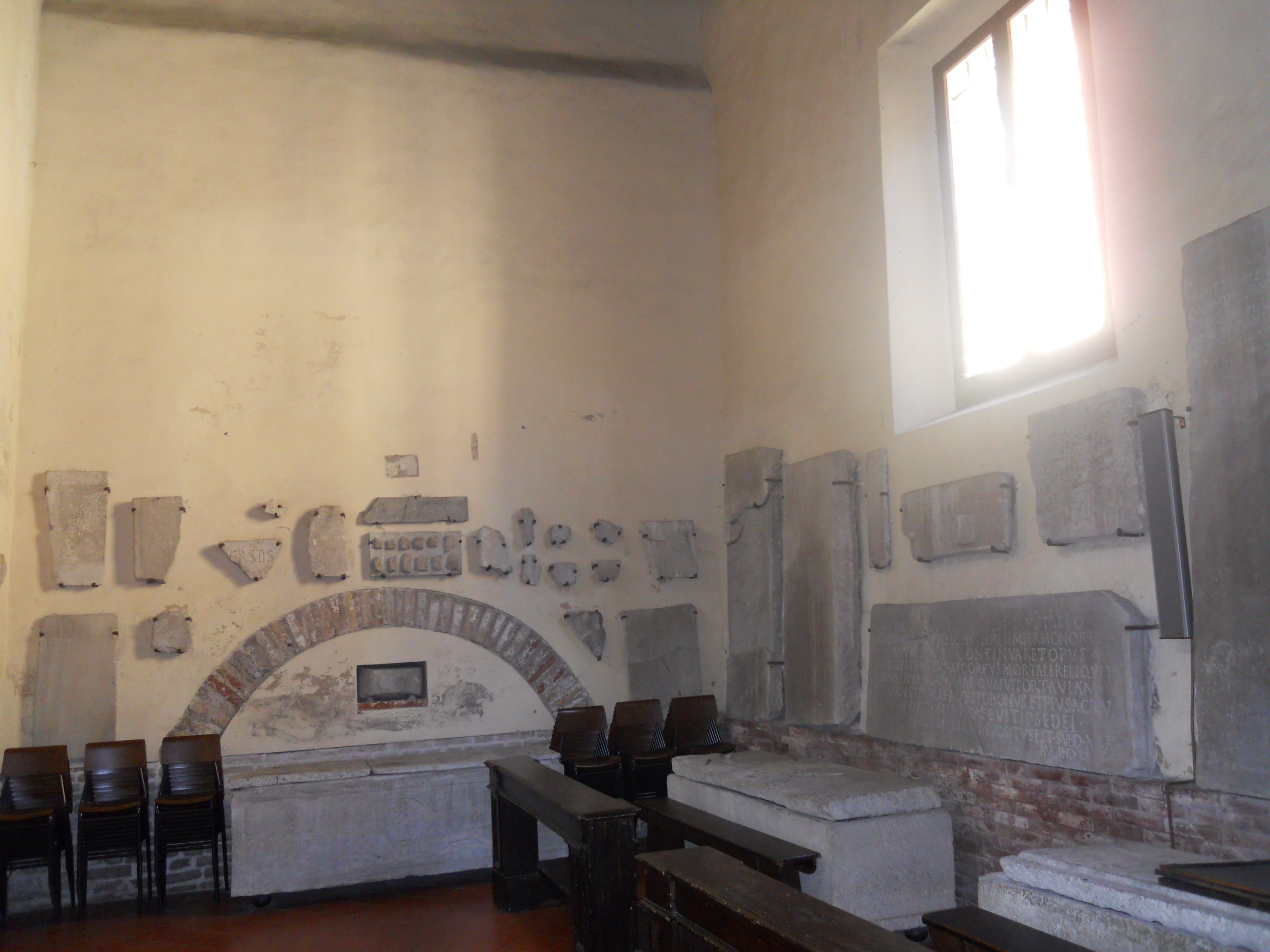 Alcuni reperti antichi (plutei, iscrizioni, sarcofagi) nella Basilica di Sant'Agata Maggiore in Ravenna.